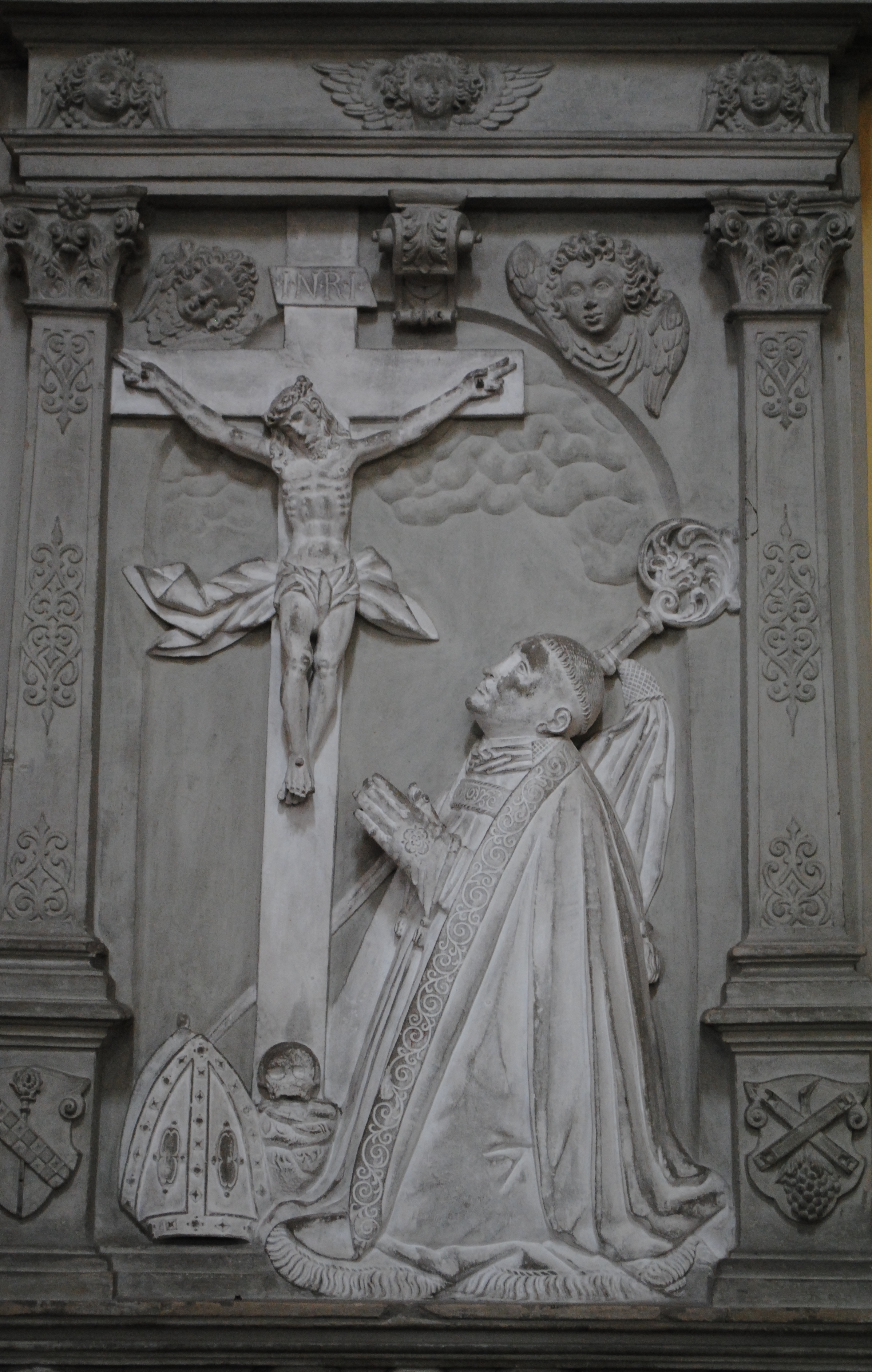 Epitaph des Caspar Brak Abt des Klosters Ebrach, Amtszeit 1615-1618